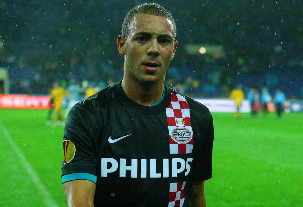 Нордин Амрабат Nodrin Amrabat